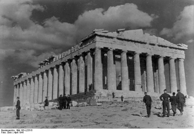 Griechenland, Parthenon, Deutsche Soldaten Griechenland: Deutsche Soldaten besichtigen den Parthenon. April 1941